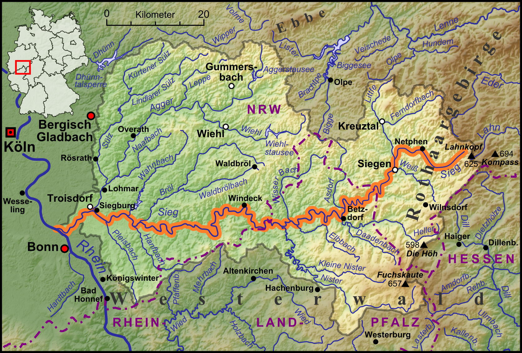 Die Sieg, ihre Nebenflüsse und das Wassereinzugsgebiet begrenzt durch die Wasserscheiden